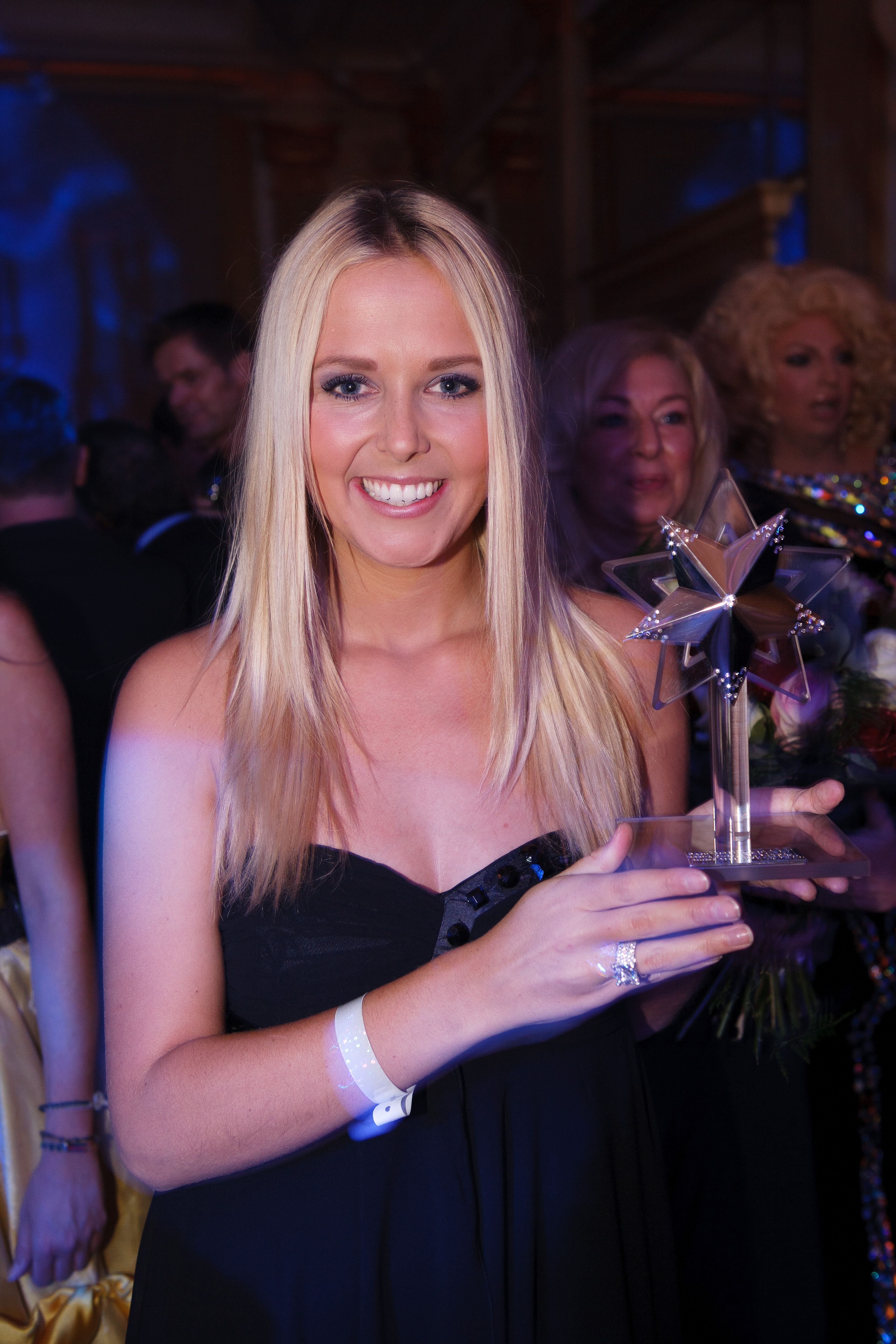 Zangeres Monique Smit tijdens de Beau Monde Awards 2010